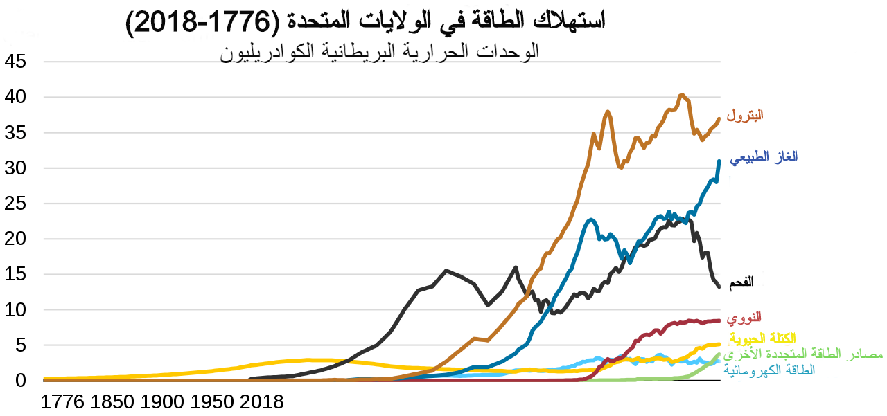 استهلاك الطاقة التاريخي للولايات المتحدة 1776-2018